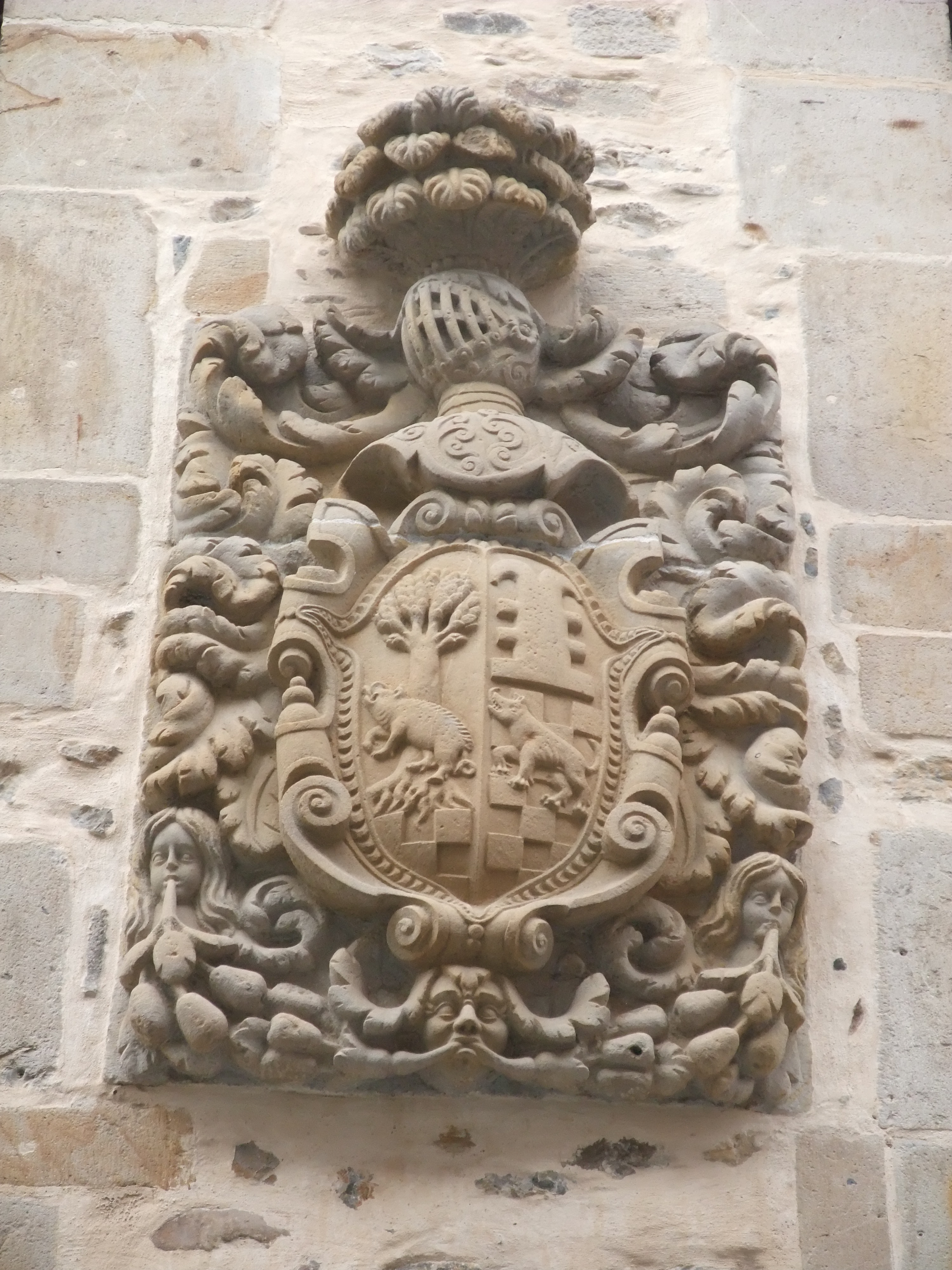 Vergara (Guipúzcoa)-Casa Zuloaga-Bereterio-2